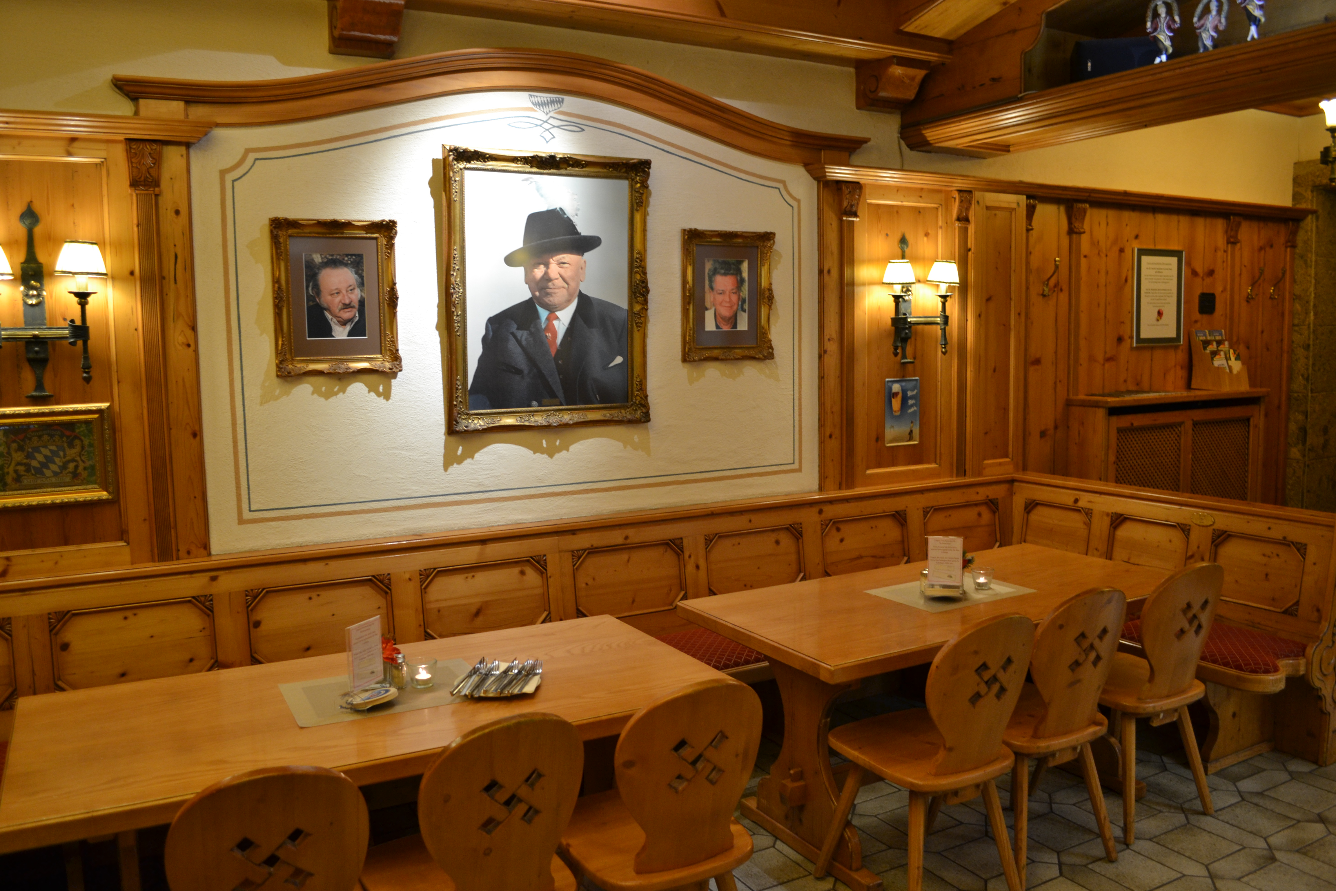 Gaststätte Heide-Volm, Planegg. Portraits: Gustl Bayrhammer; Willy Heide; ???